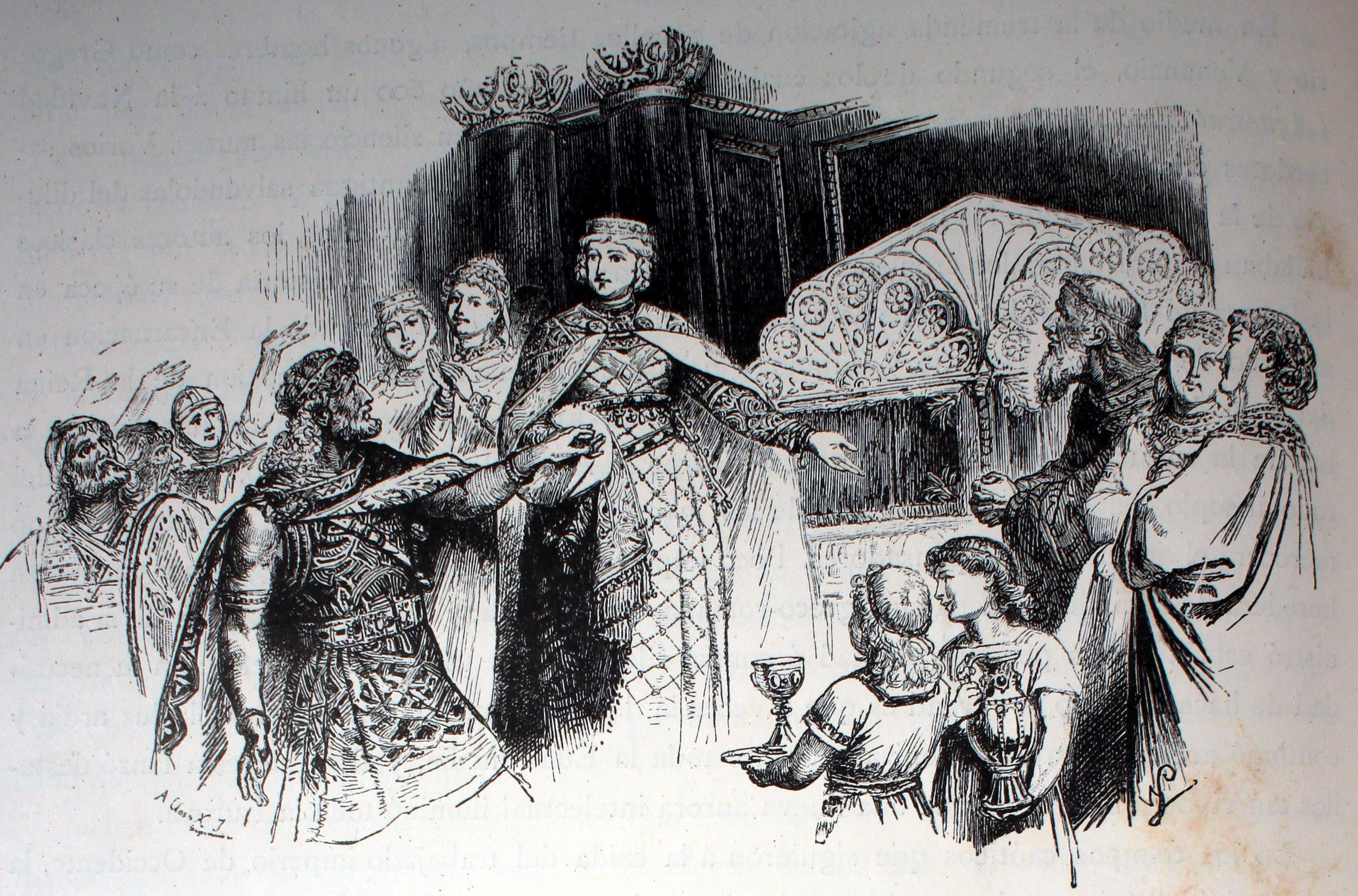 "Teodolinda elige por esposo al Duque de Turín". Ilustraciones de la obra : Germania : dos mil años de historia alemana / por Juan Scherr. - Barcelona : Montaner y Simón, 1882.